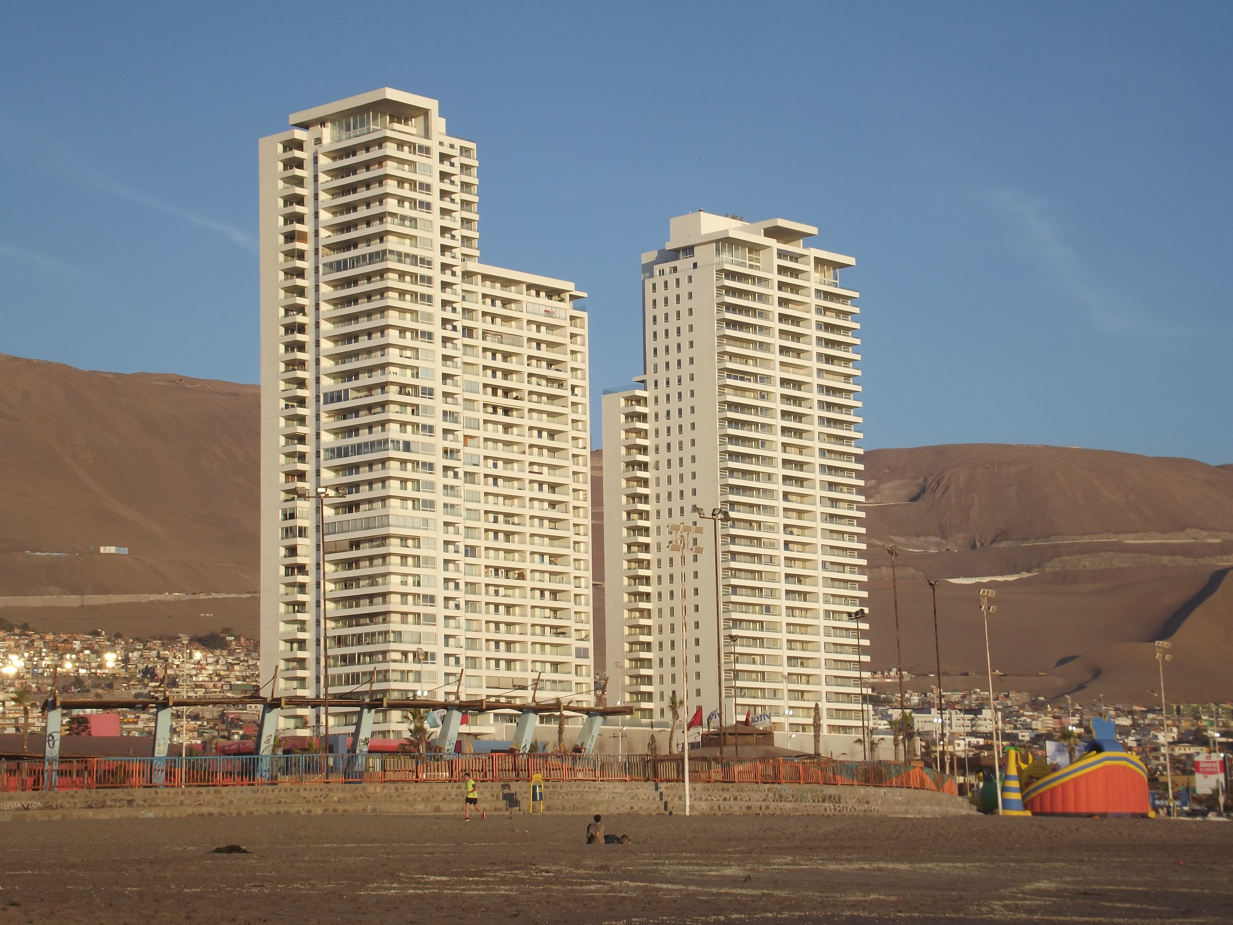 Edificio más alto del Norte Grande de Chile y más alto fuera de la Region Metropolitana.